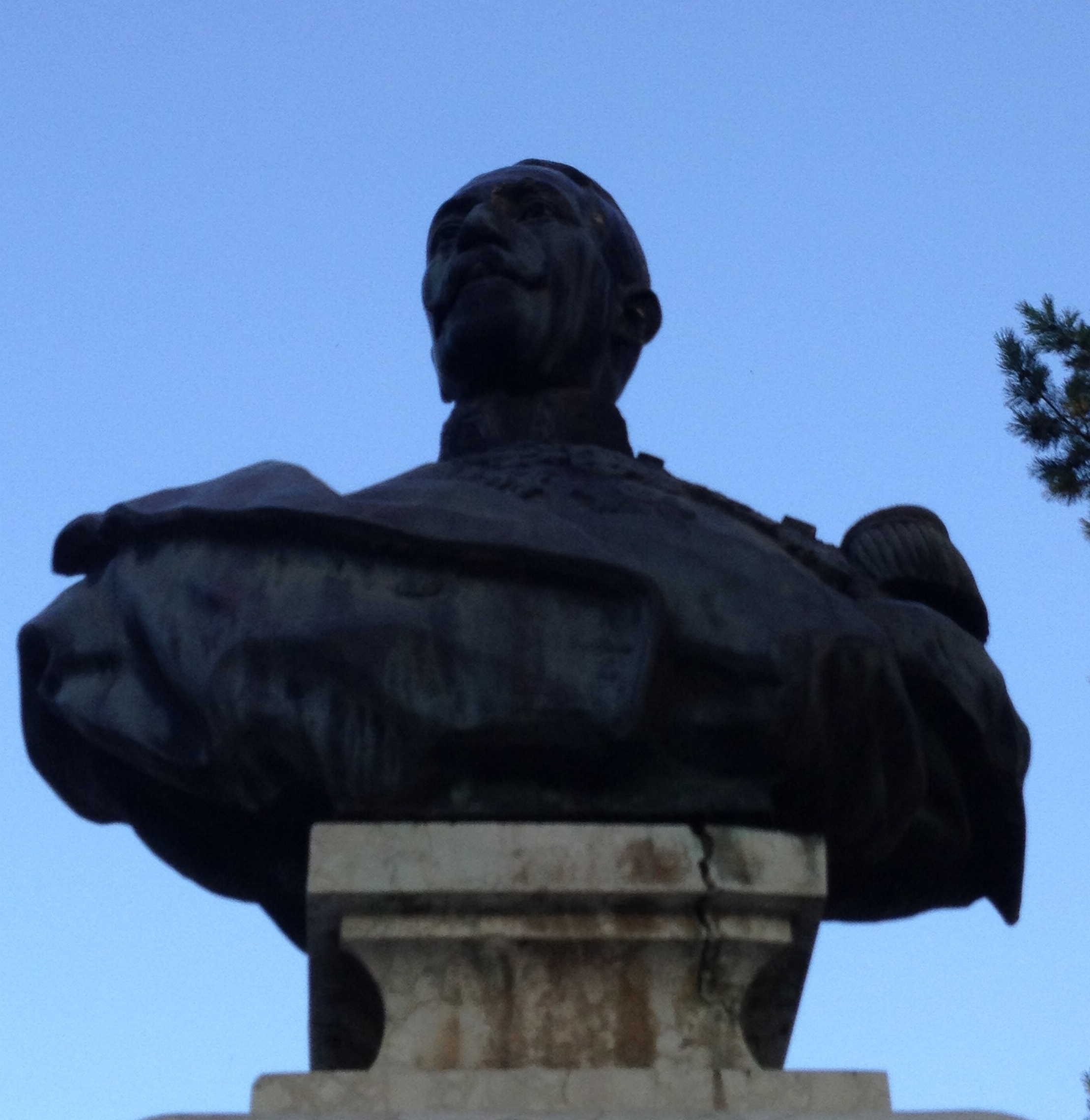 Bustul inspectorului de artilerie Mihai Pastia